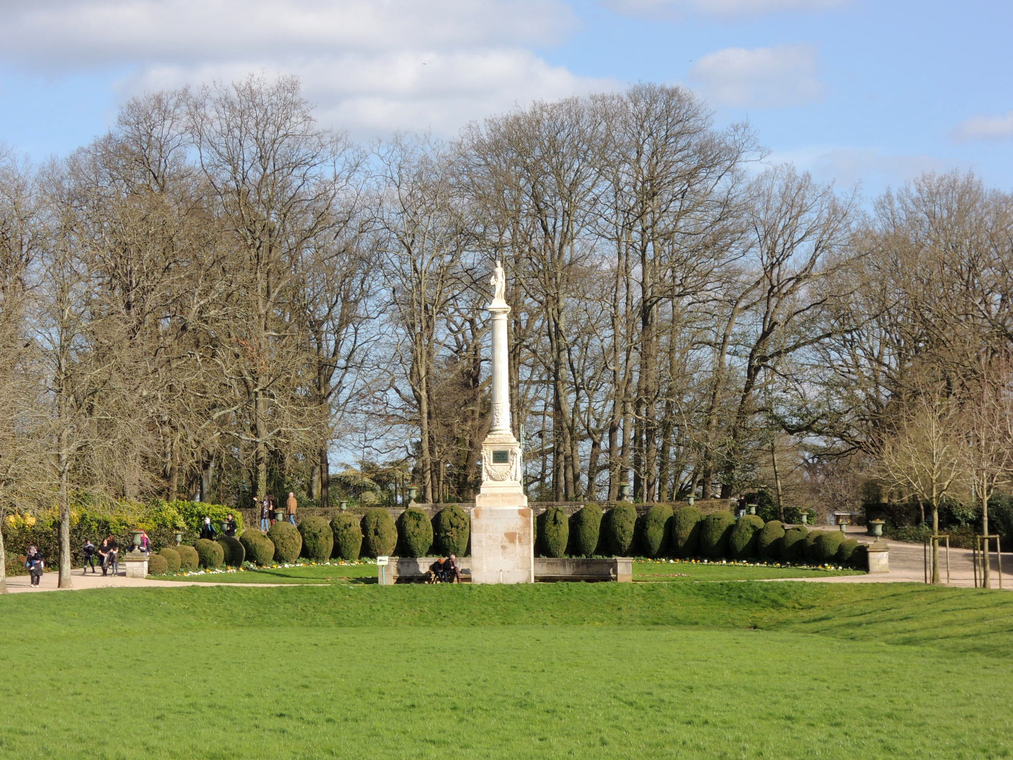 Le boulingrin en mars 2014, avec la colonne de Juillet entièrement rénovée.